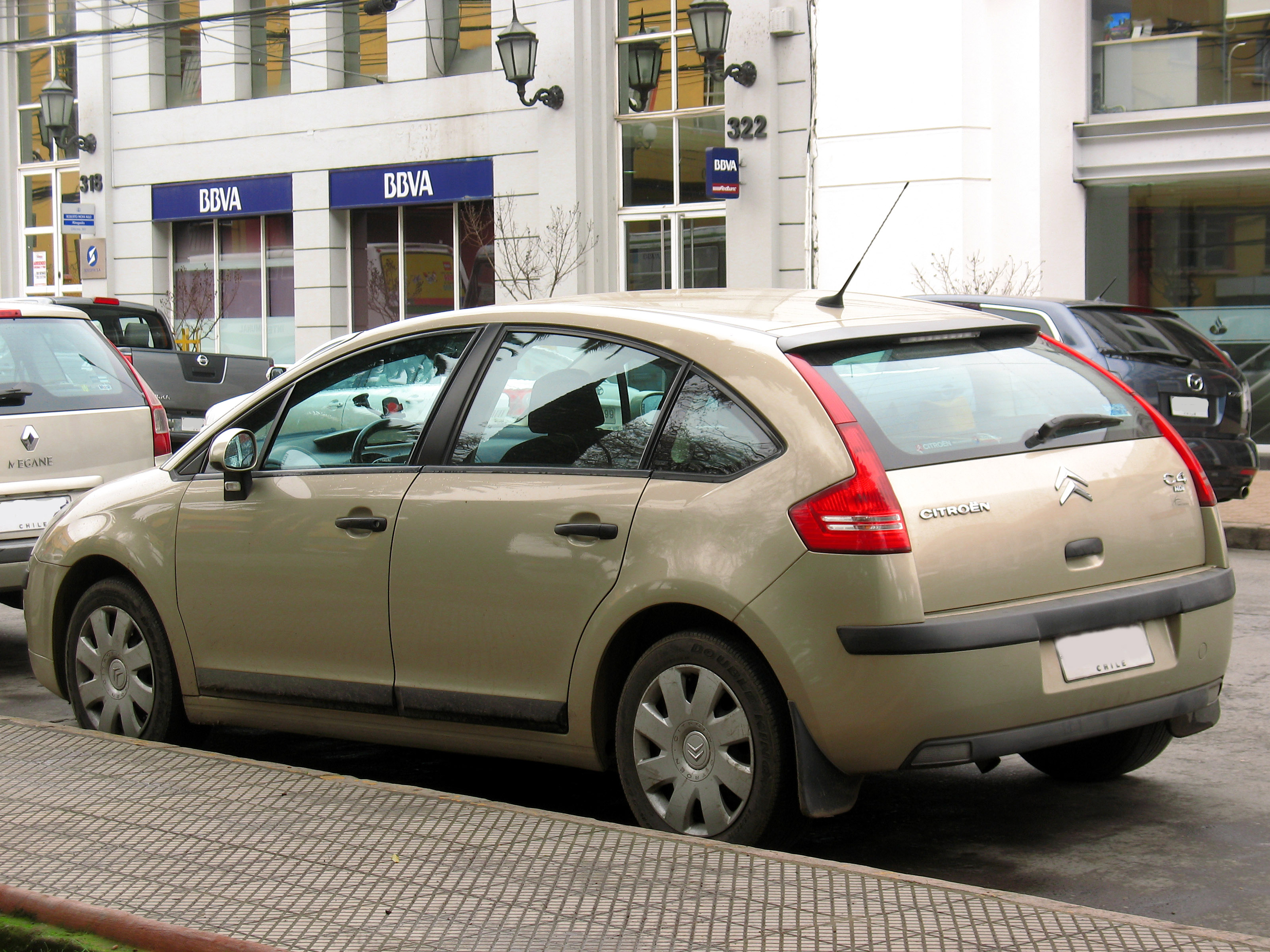 Citroen C4 1.6 2008